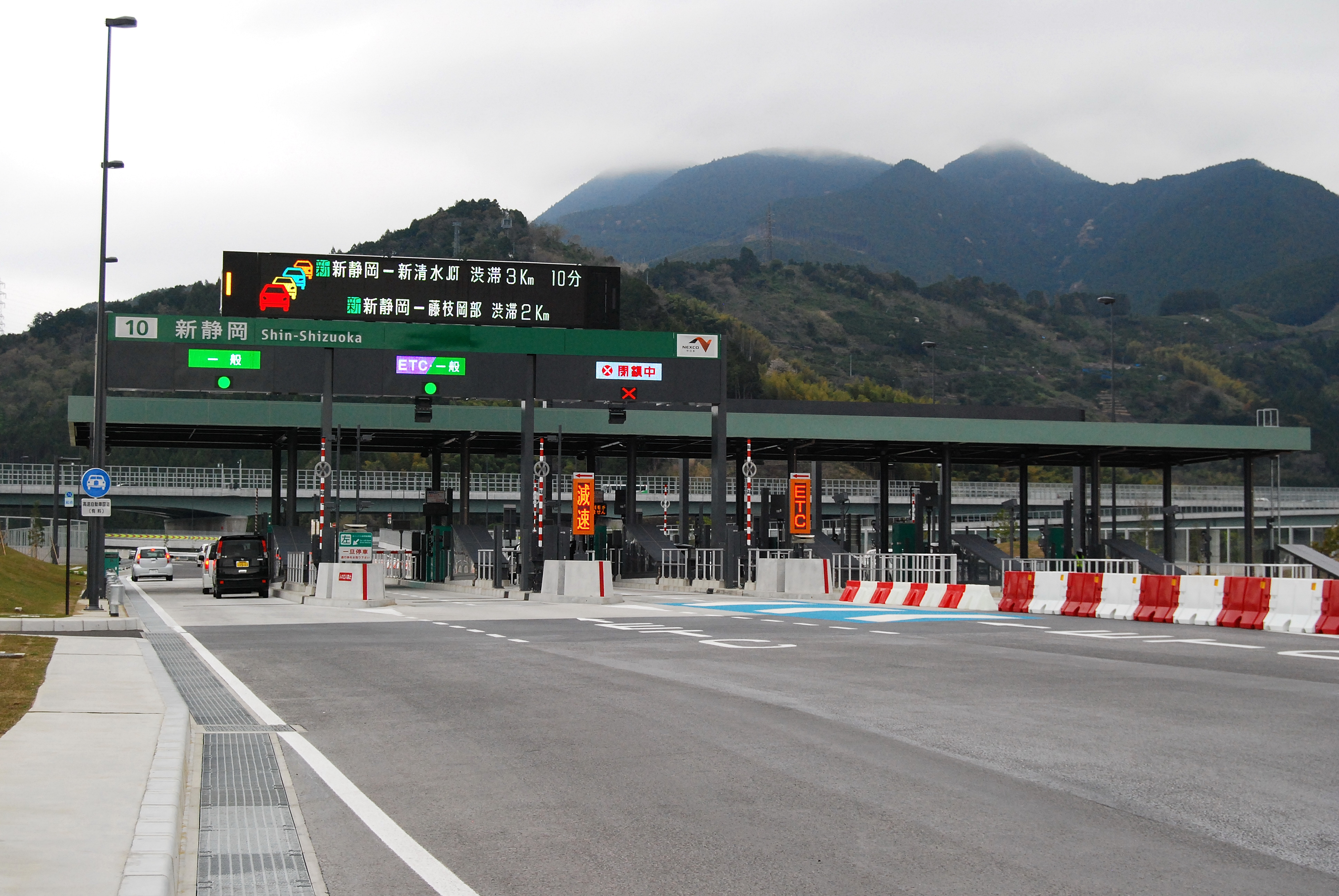 新東名高速道路、新静岡インターチェンジ出入口（安全な場所で撮影）